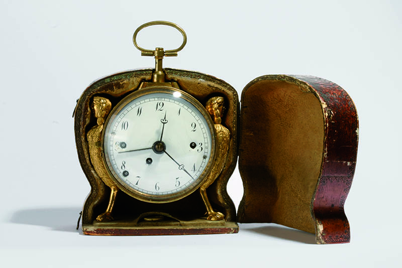 Offizierswecker, Wien um 1820, Deutsches Uhrenmuseum, Inv. 12-2504